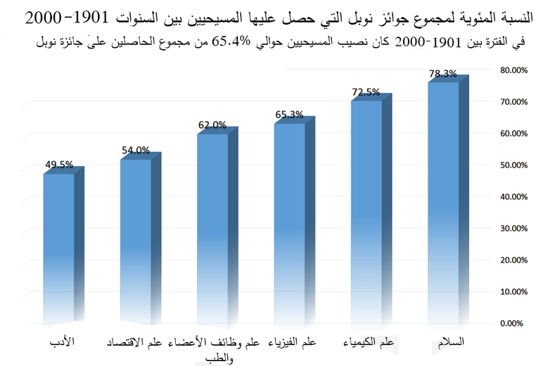 (جوائز نوبل التي حصل عليها المسيحيون (حسب الجائزة